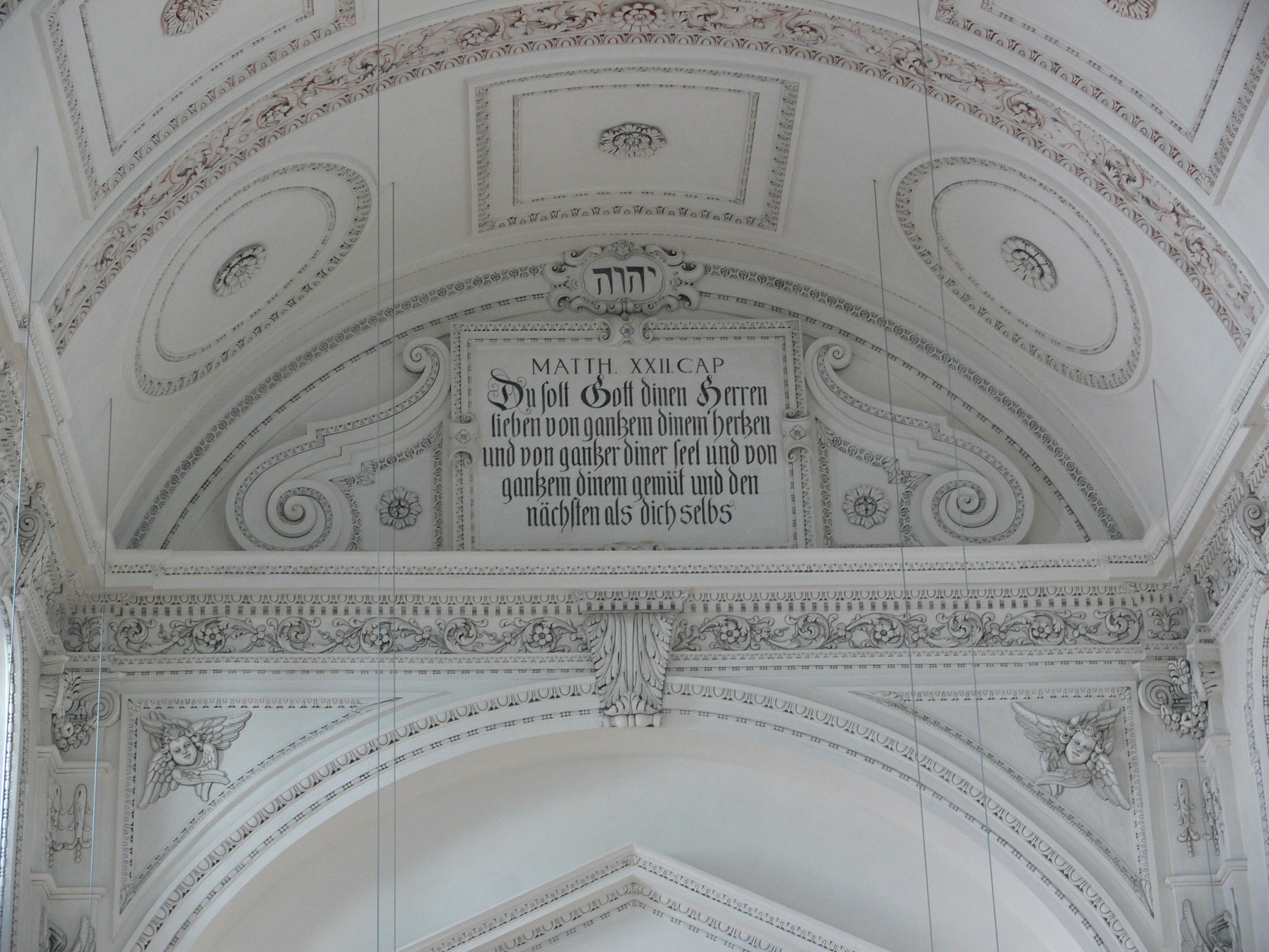 Zürich, Predigerkirche, Inschrift mit dem Gebot der Nächstenliebe (Matthäus 22, 37–39)